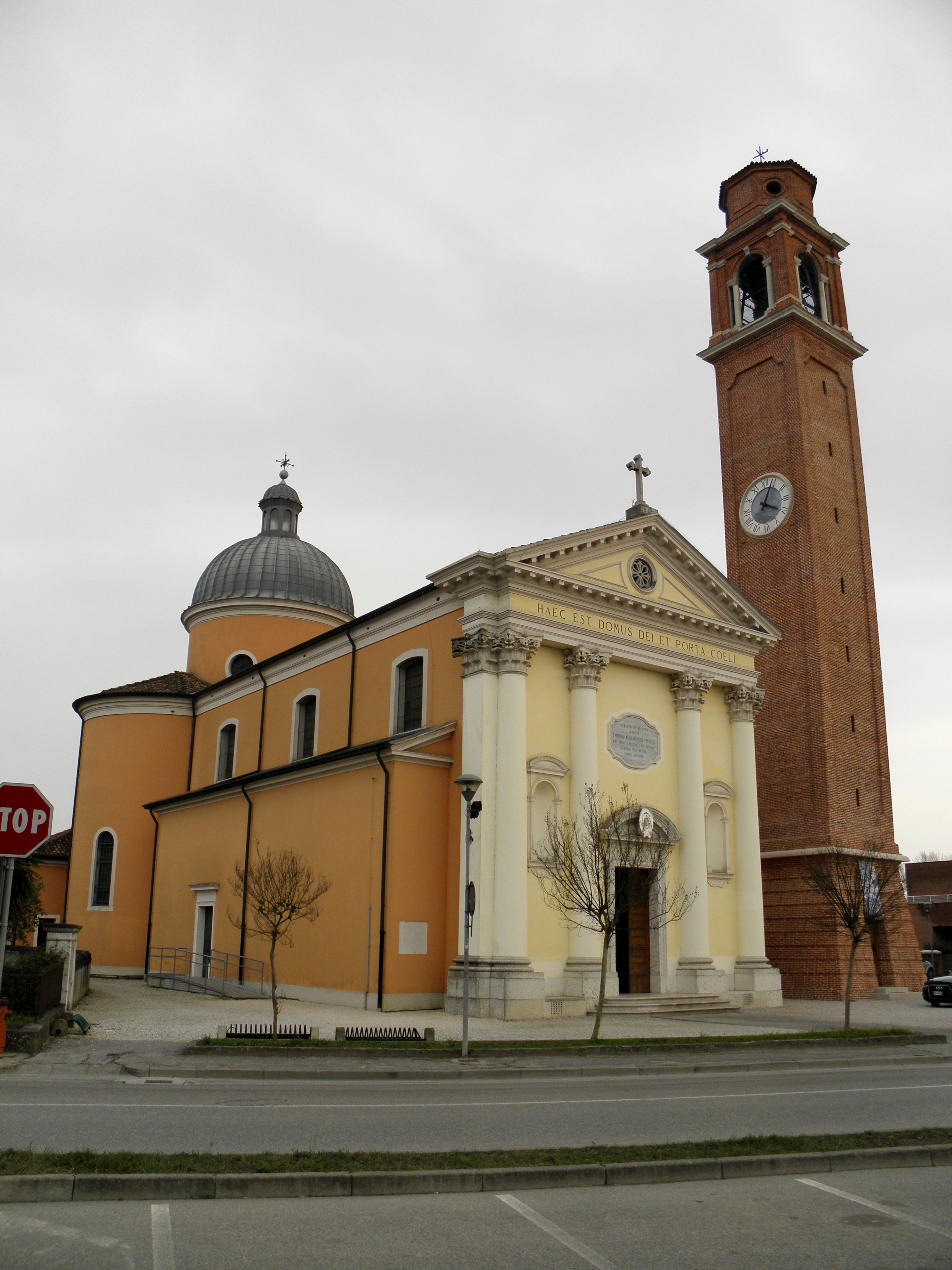 Sant'Ambrogio, frazione di Trebaseleghe: la chiesa parrocchiale di Sant'Ambrogio Vescovo e Dottore.